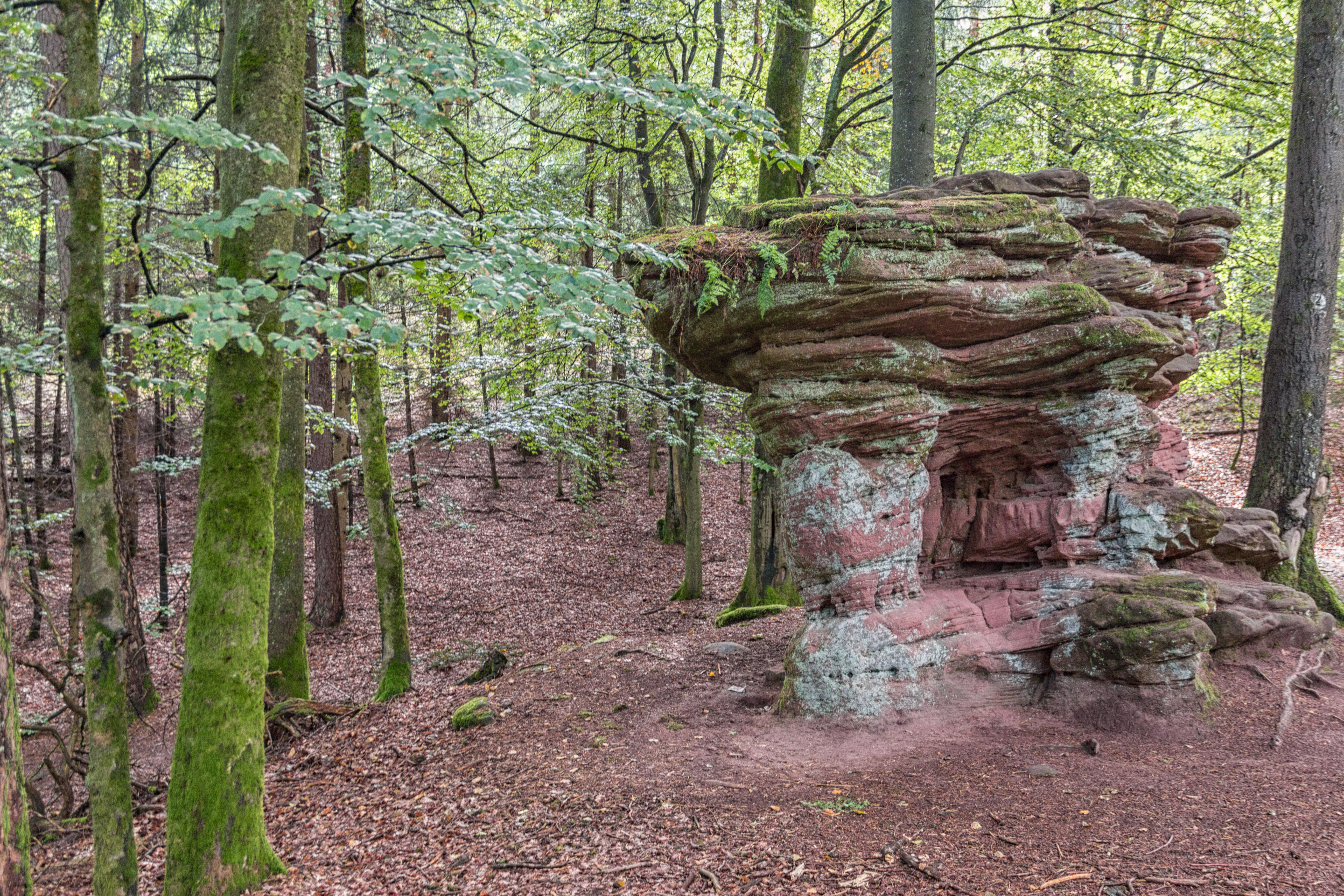 Teufelsschmiede, , Felsen, Naturpark Pfälzerwald, Hinterweidenthal